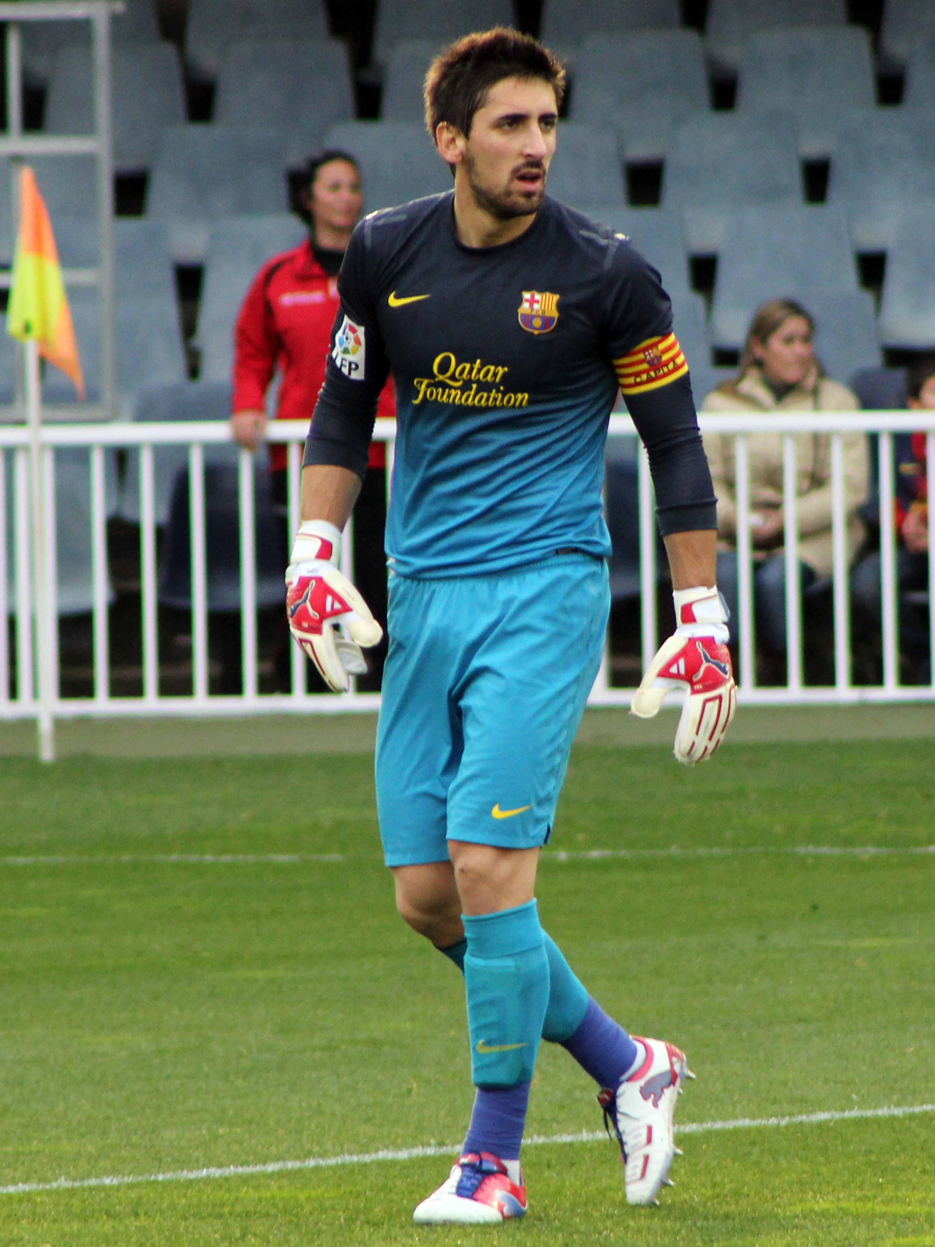 Foto realizada por Javier Segura (@castroquini en Twitter)